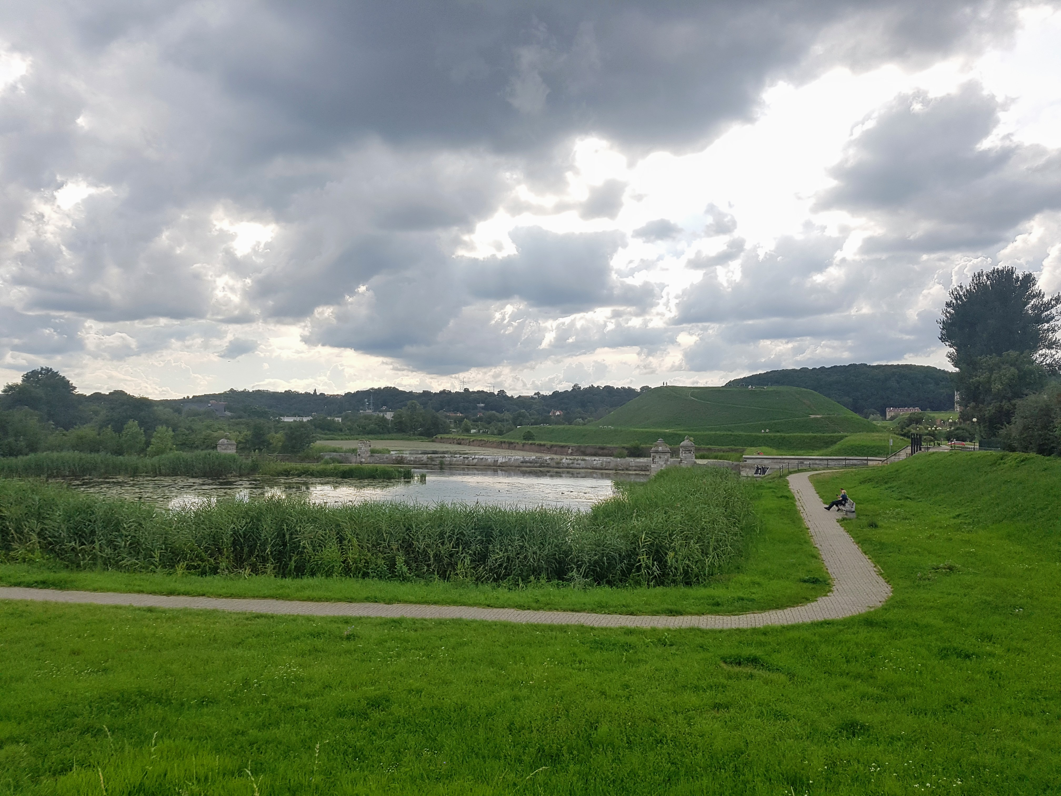 Opływ Motławy. Widok na Bastion Żubr, w kierunku Bastionu św. Gertrudy.